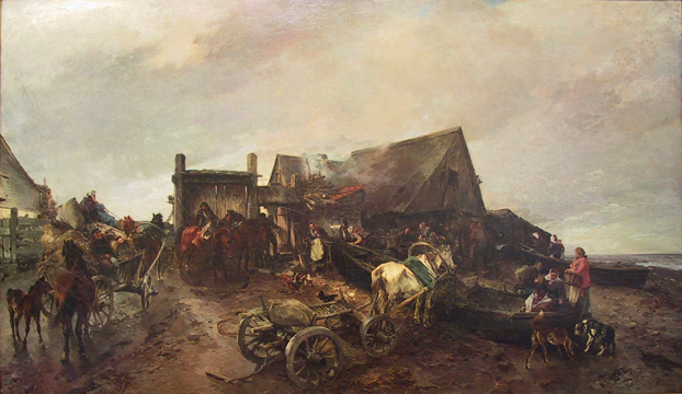 Dies ist ein Ölbild des baltisch-deutschen Malers Gregor von Bochmann (1850 - 1930). Es hat den Titel "Alter Fischmarkt bei Reval" (Reval ist die Hauptstadt von Estland und heißt heute Tallinn). Das Bild hat eine Grösse von 99 x 169 cm und hat die Nummer B0024 im Werkverzeichnis des Malers. Das Photo wurde 2002 aufgenommen. Das Bild gehört der Stiftung museum kunst palast (Inv.-Nr. M 4538), Düsseldorf. The photograph was taken in 2002. Die Urheberrechts-Schutzdauer des hier abgebildeten flächigen Kunstwerks ist weltweit abgelaufen, da der Künstler bereits seit über 70 Jahren tot ist. Es ist somit gemeinfrei ('public domain'). Ebenfalls gemeinfrei ist die vorliegende fotografische Wiedergabe des Werkes, da sie keine eigene Schöpfungshöhe aufweist.